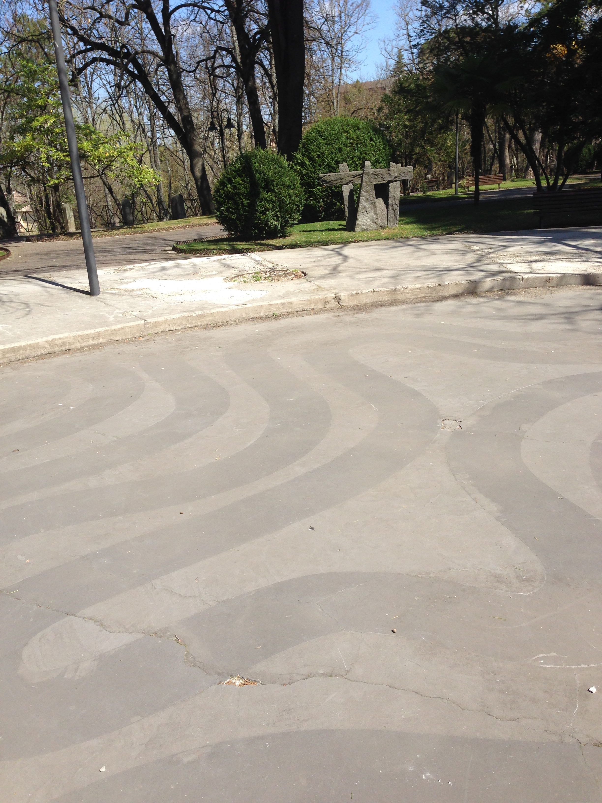 Casina dell'ippocastano. Opere di Sol LeWitt e Agapito Miniucchi